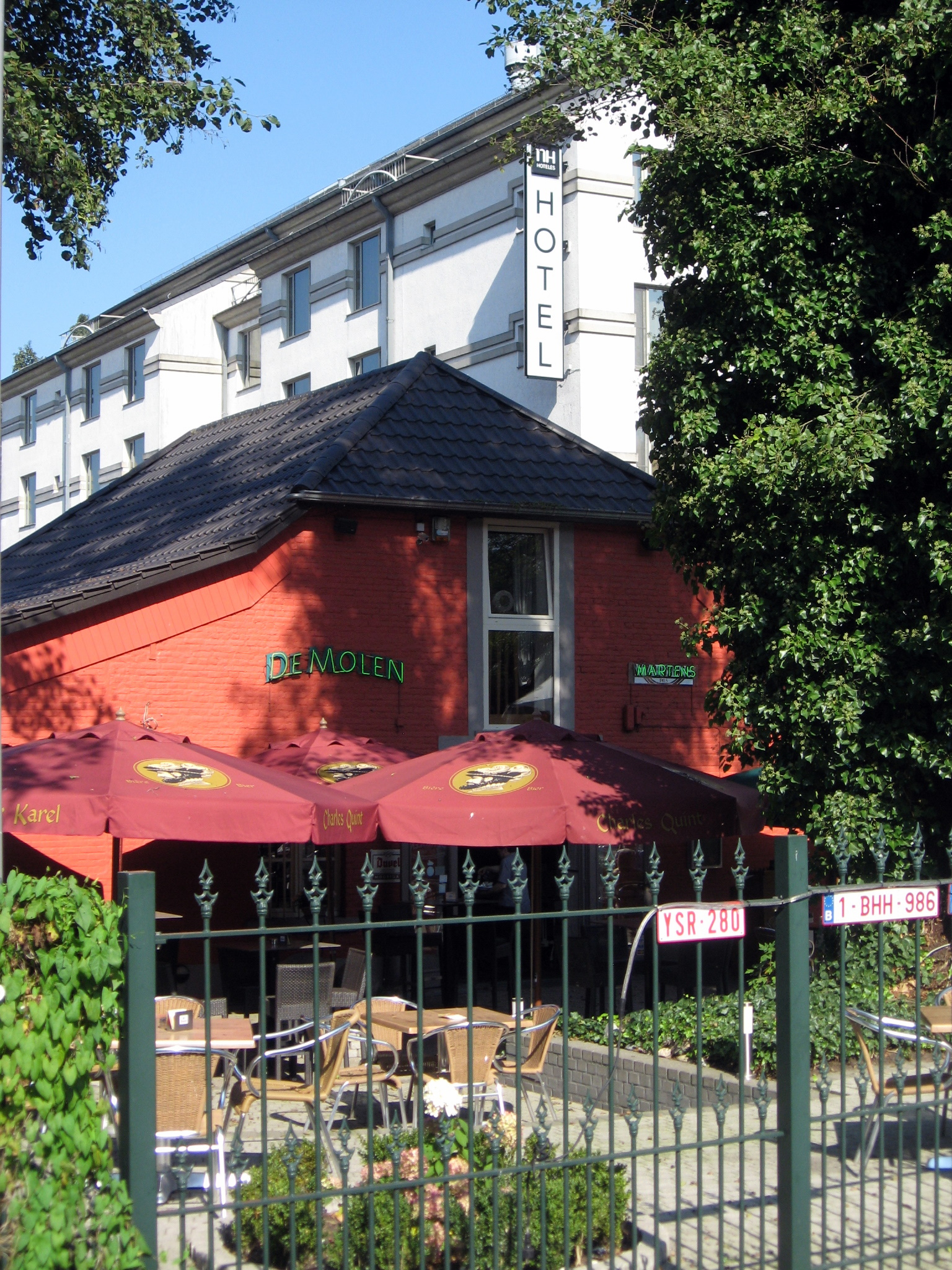 Café, voormalige watermolen, Molenstraat in Genk